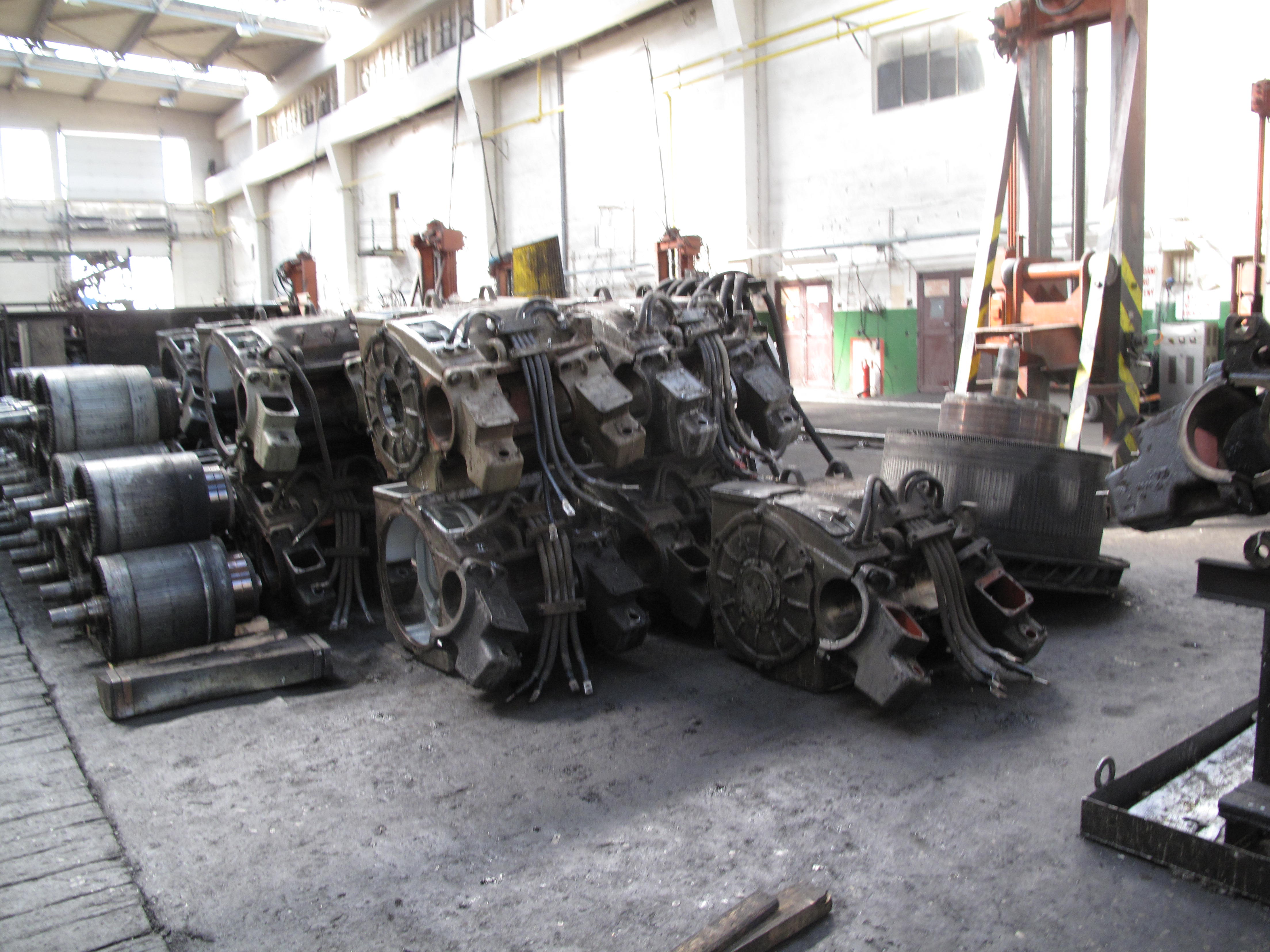 Depo v Maloměřicích